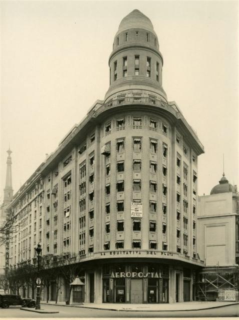 Edificio de la compañía de seguros La Equitativa del Plata, construido en la esquina sudeste de la calle Florida y la Avenida Roque Sáenz Peña. Proyectado por el arquitecto Alejandro Virasoro en 1927. Buenos Aires, Argentina.